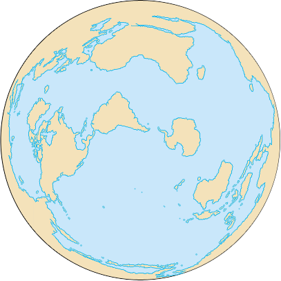 Los 5 océanos de la Tierra